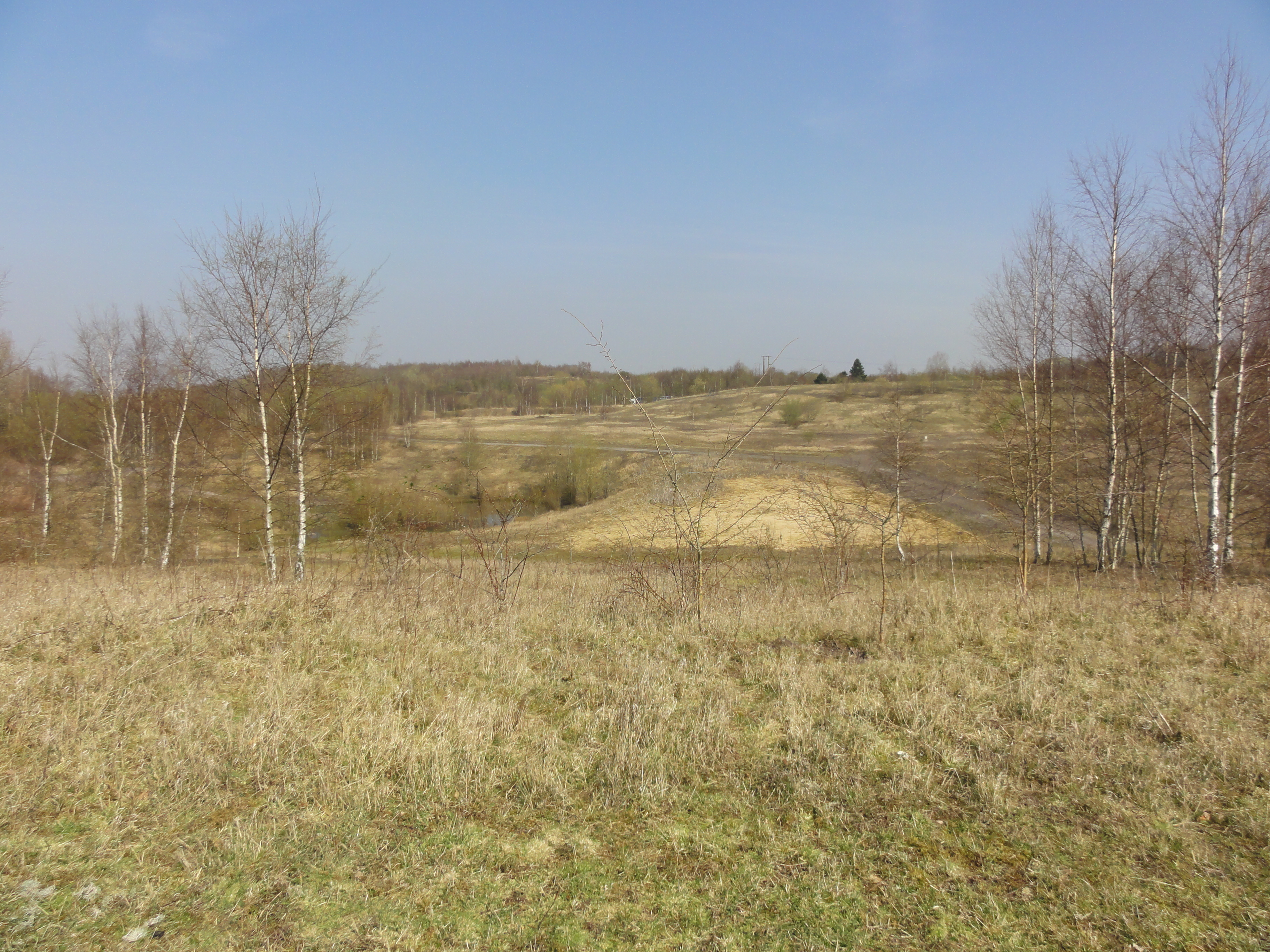 Terril n° 24 dit 4 d'Auchel, fosse n° 4 - 4 bis de la Compagnie des mines de Marles, Auchel et Burbure, Pas-de-Calais, Nord-Pas-de-Calais, France.